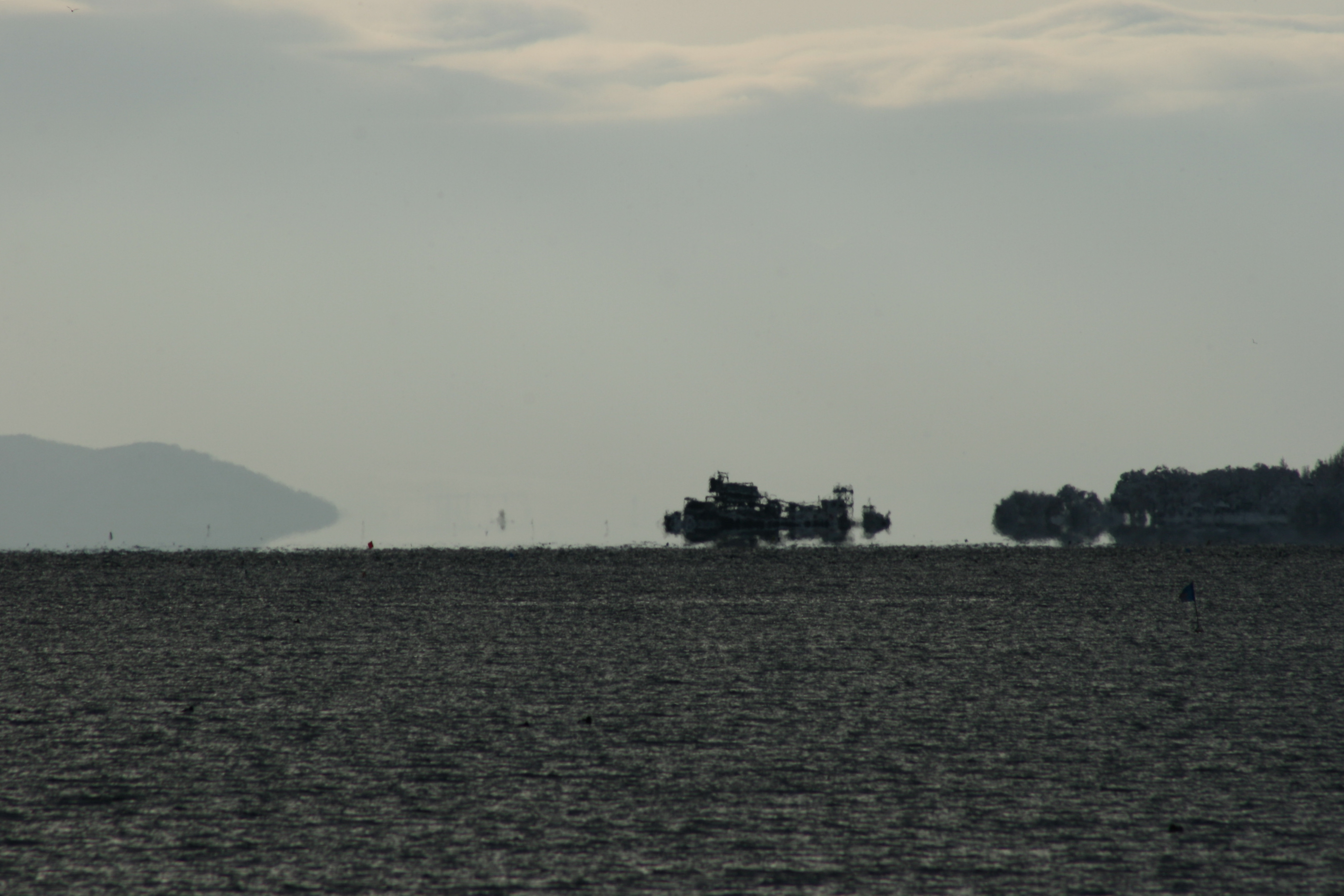 冬の琵琶湖の蜃気楼、近江今津付近から安曇川方向を望む